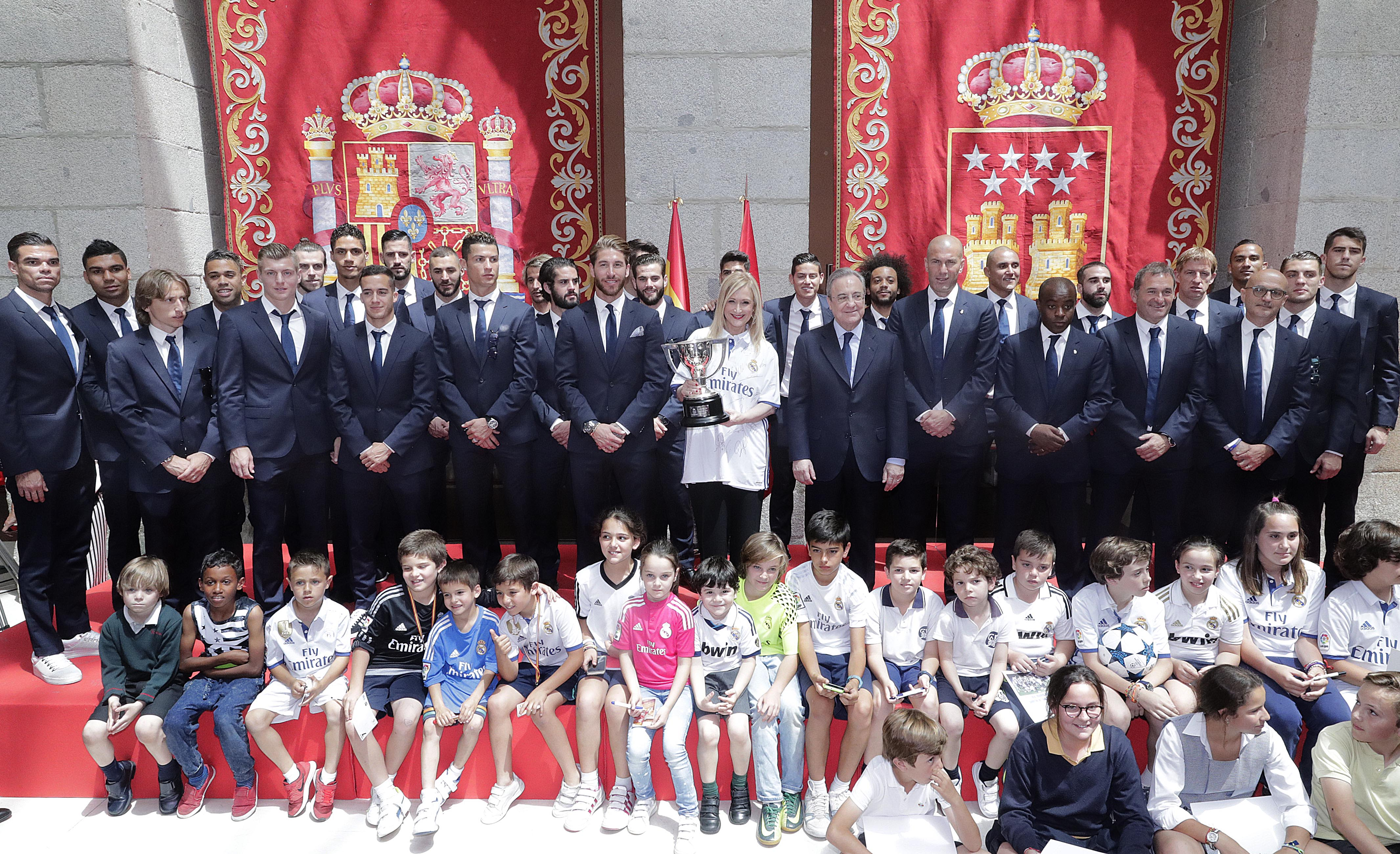 Hoy he recibido, en la Real casa de Correos, a los campeones nuevos campeones del liga, El Real Madrid, un equipo universal que está paseando por todo el mundo el nombre de Madrid y de España. Esta liga es un premio a la constancia, al buen juego, que en definitiva es sinónimo de jugar bien permanentemente, para un equipo que juega con sacrificio, compañerismo, respeto al rival y solidaridad, un equipo reconocido en todo el mundo por sus éxitos y también por los principios deportivos con los que juega. ¡Hala Madrid!